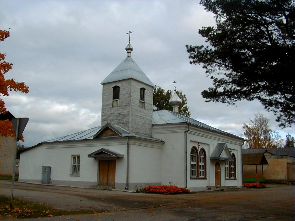 Sedas pareizticīgo baznīca 2004-10-09